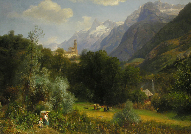 Eduard Schönfeld (1839–1885): Weinernte in Südtirol / Wine harvest in South Tyrol